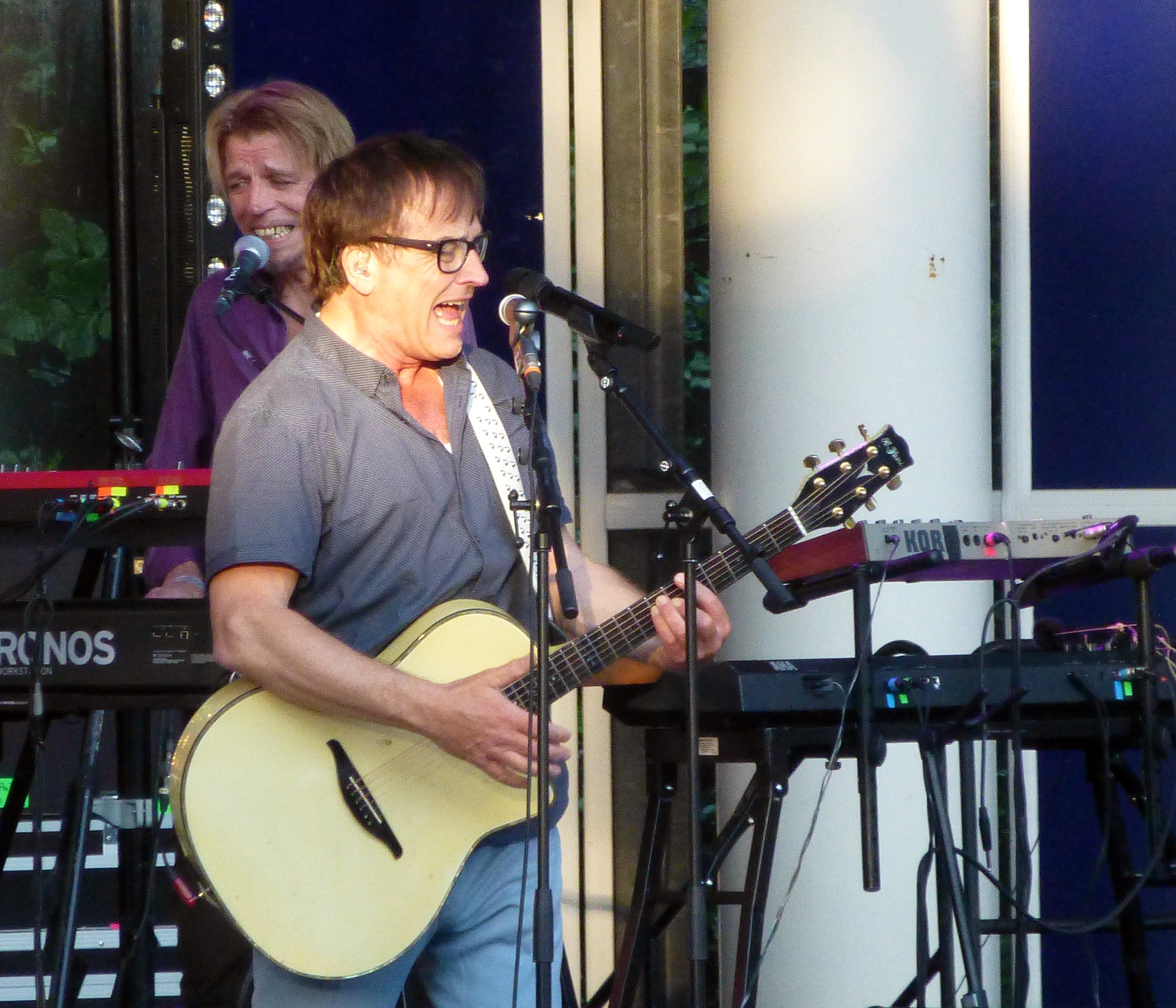 Lars Hug på scenen i Tivoli Friheden i Aarhus 3. juni 2016